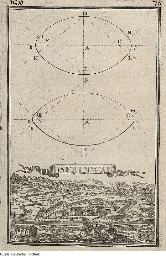 Original image description from the Deutsche FotothekGeometrie & Architektur & Festungsbau & Vermessung